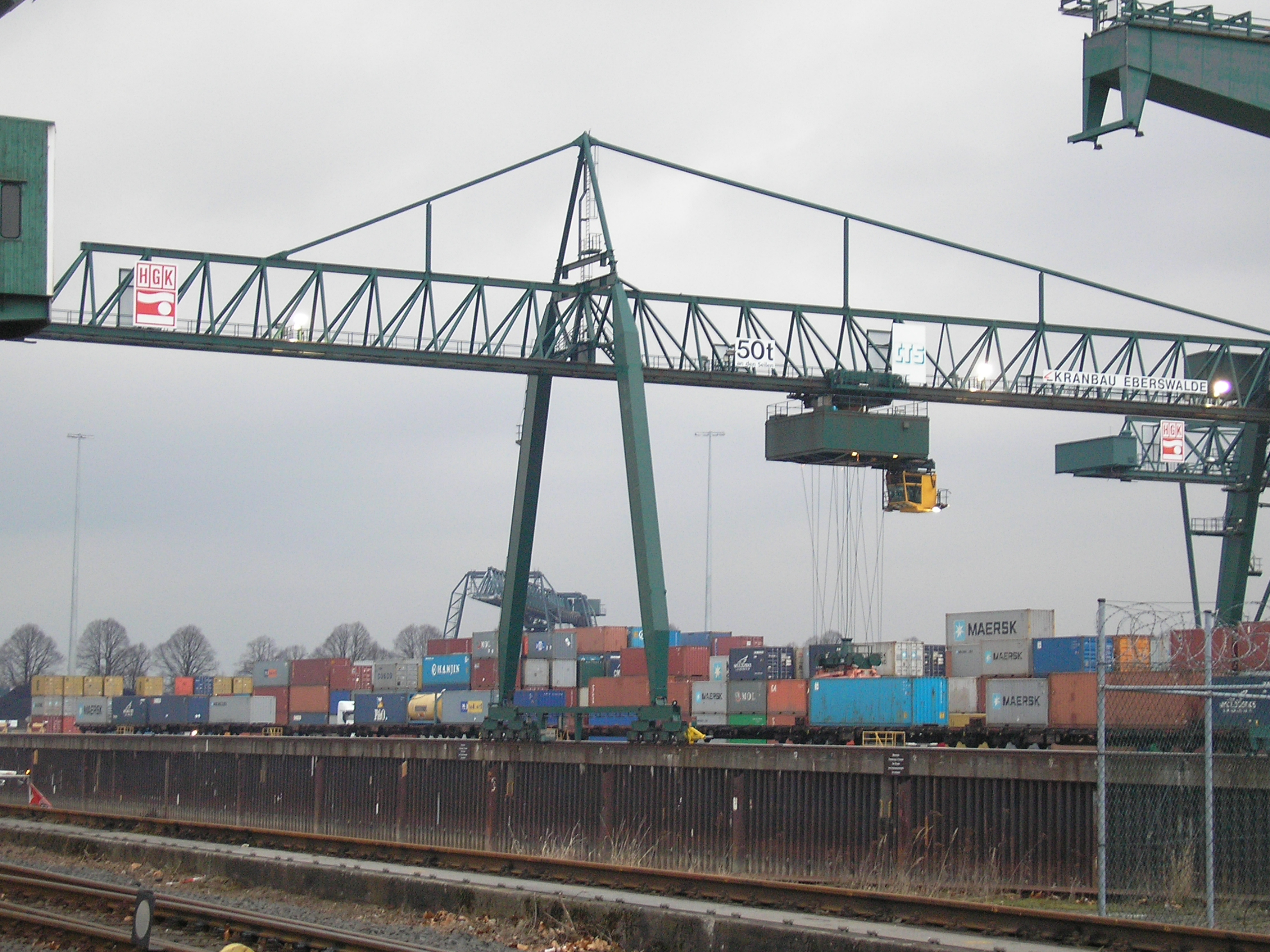 Hafen Niehl I, Köln-Niehl, HGK-Containerbrücke